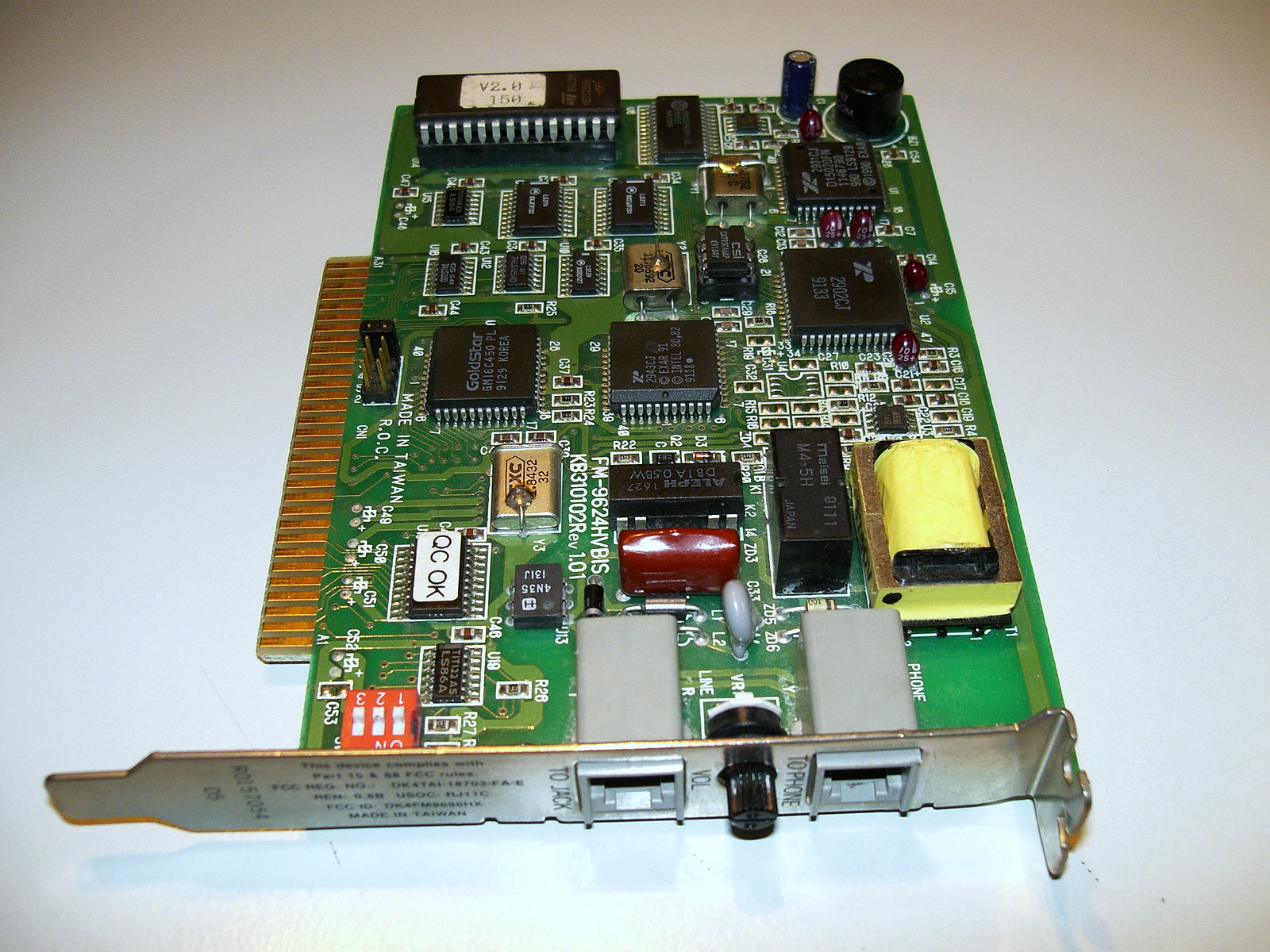 Fax Modem 9600Baud AT-Bus